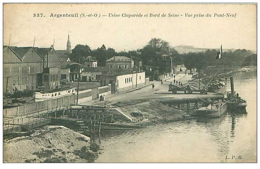 Usine Claparède d'Argenteuil au début du XXe siècle.